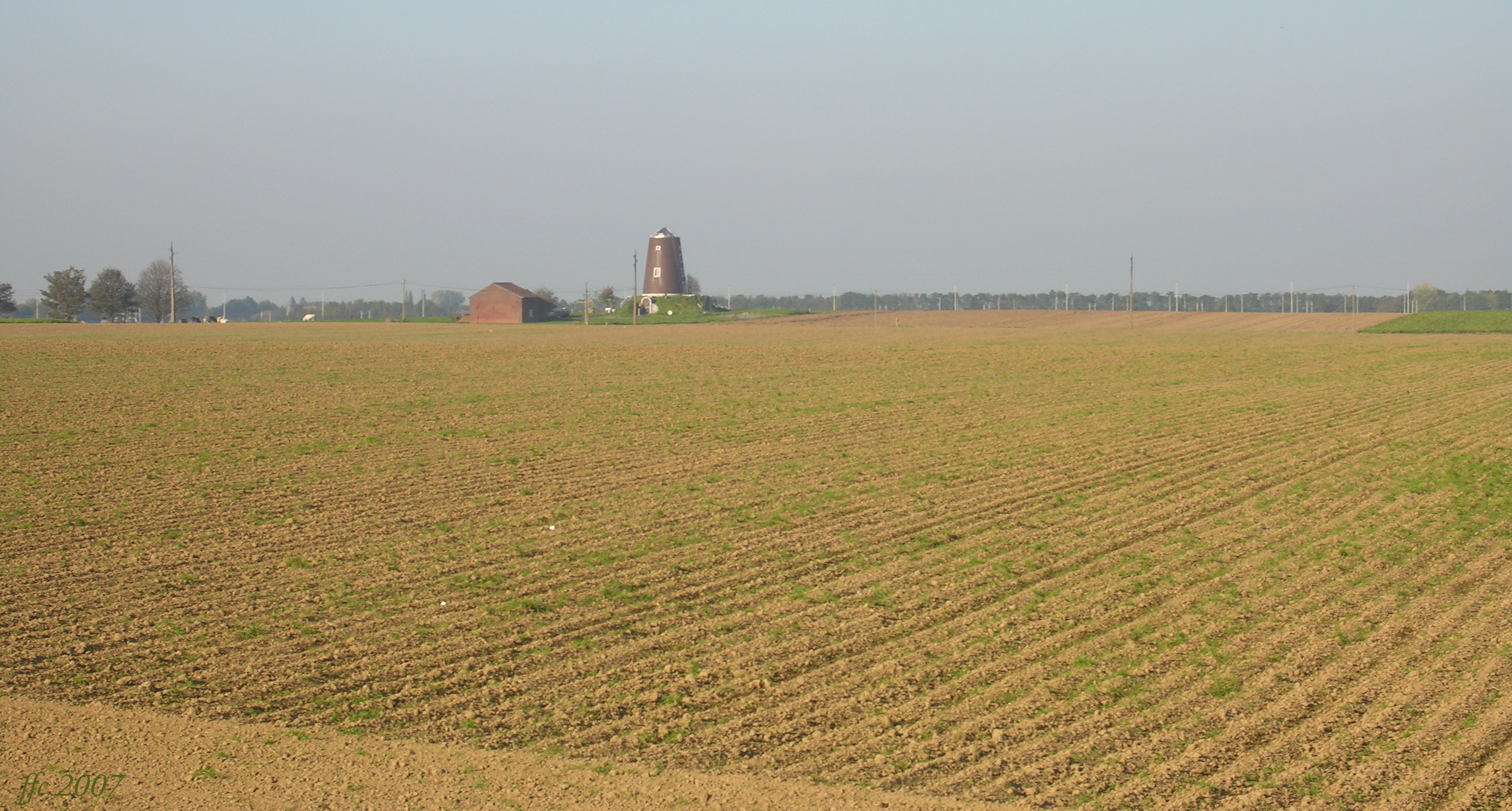 Between Fexhe-le-haut-Clocher and Momalle (Remicourt) (Belgium) Fields and former wind mill Champs labourés et ancien moulin-a vent Camps conreats i molí a vent Versgeploegde velden en voormalige windmolen